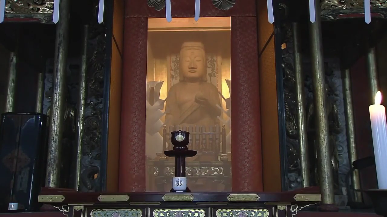 清澄寺摩尼殿に安置の虚空蔵菩薩